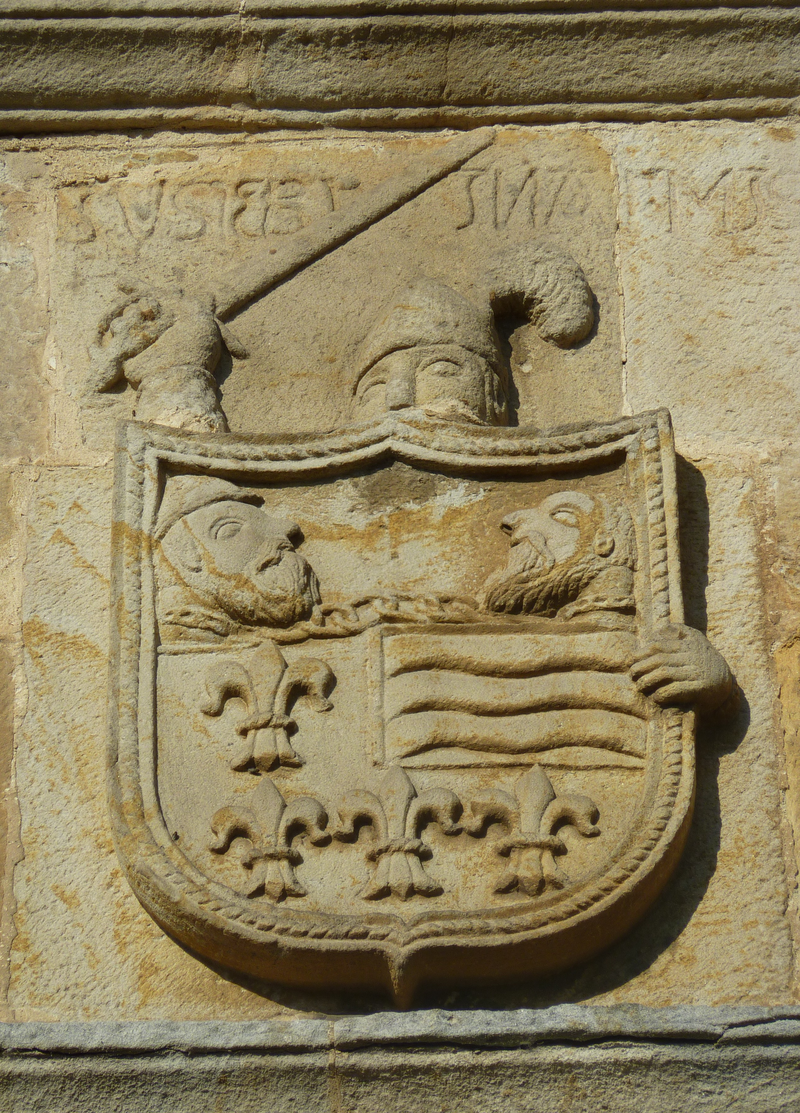 Escudo.